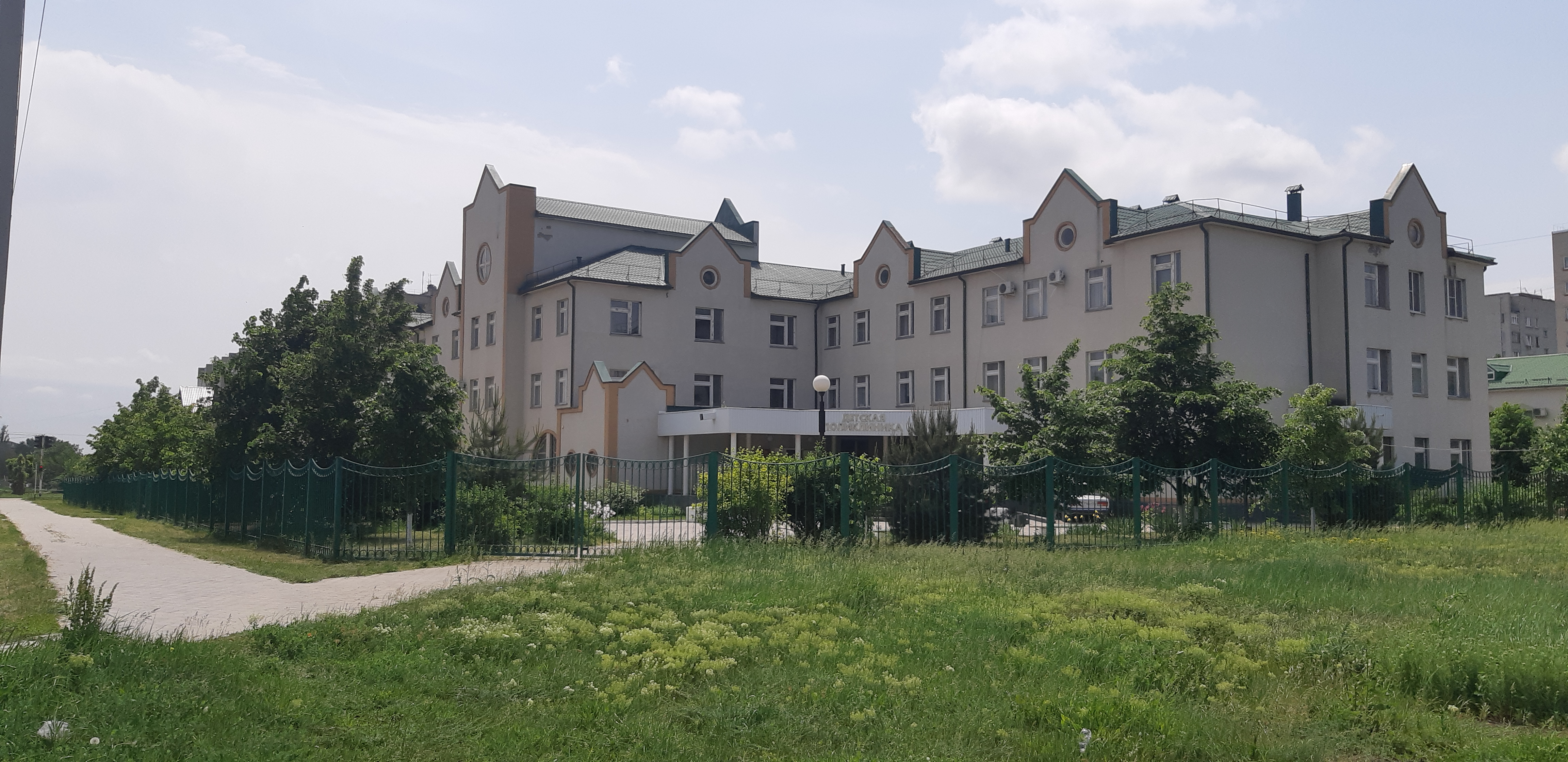 Детская поликлиника